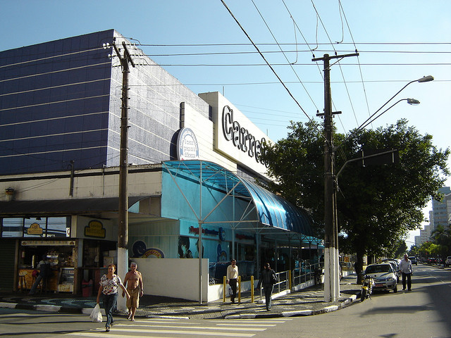 Hipermercado Carrefour em Santos, SP, Brasil.